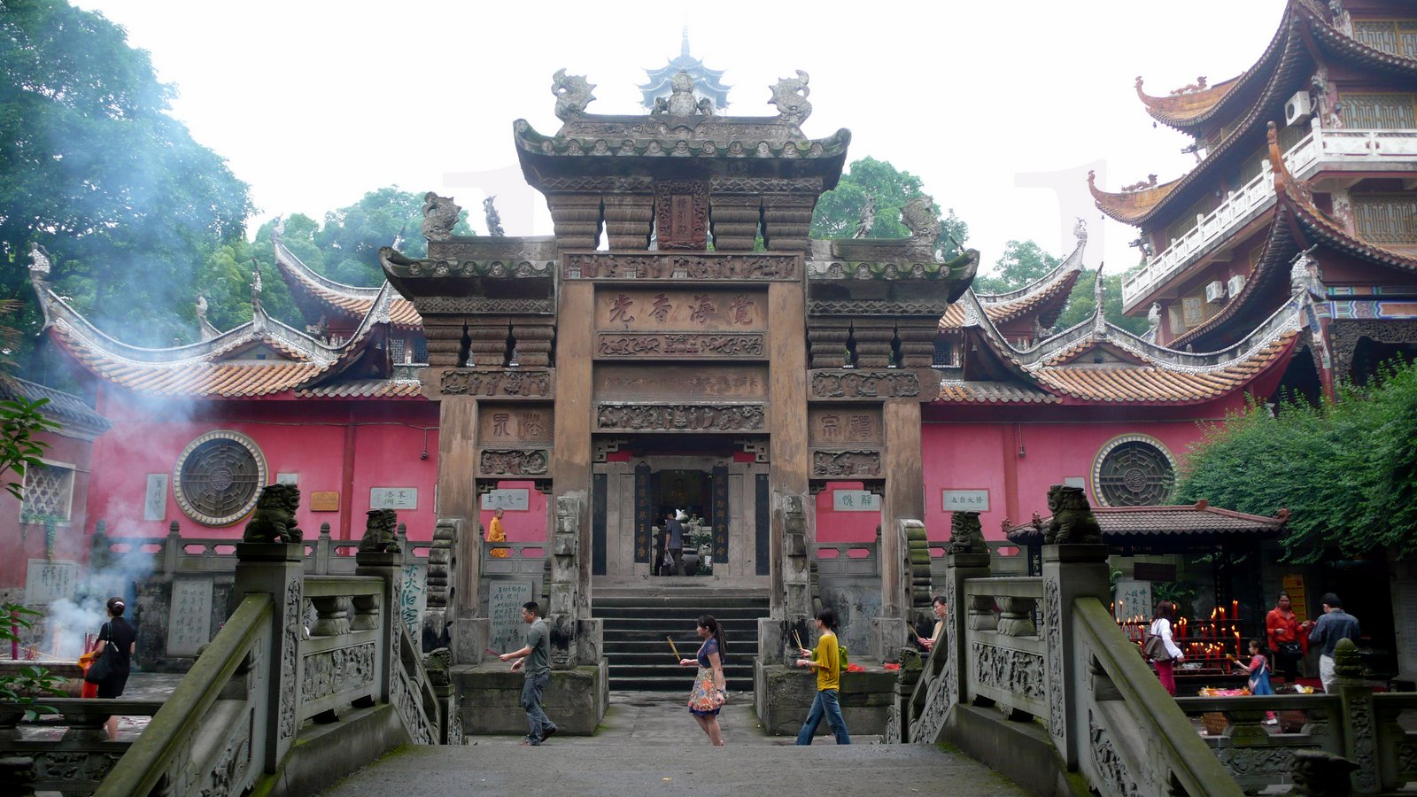 重慶華巖寺接引殿牌坊